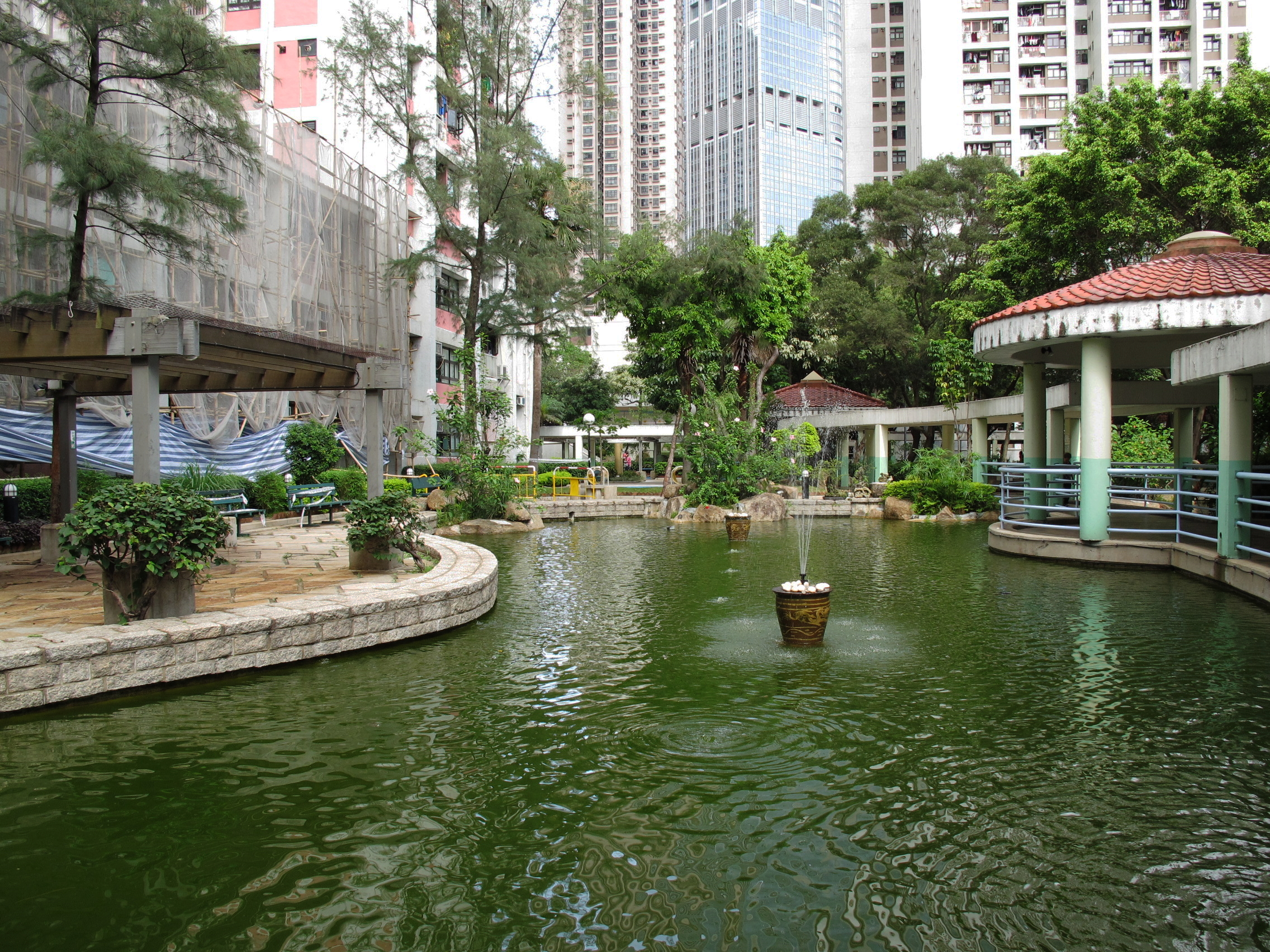 Clague Garden Estate Ponds